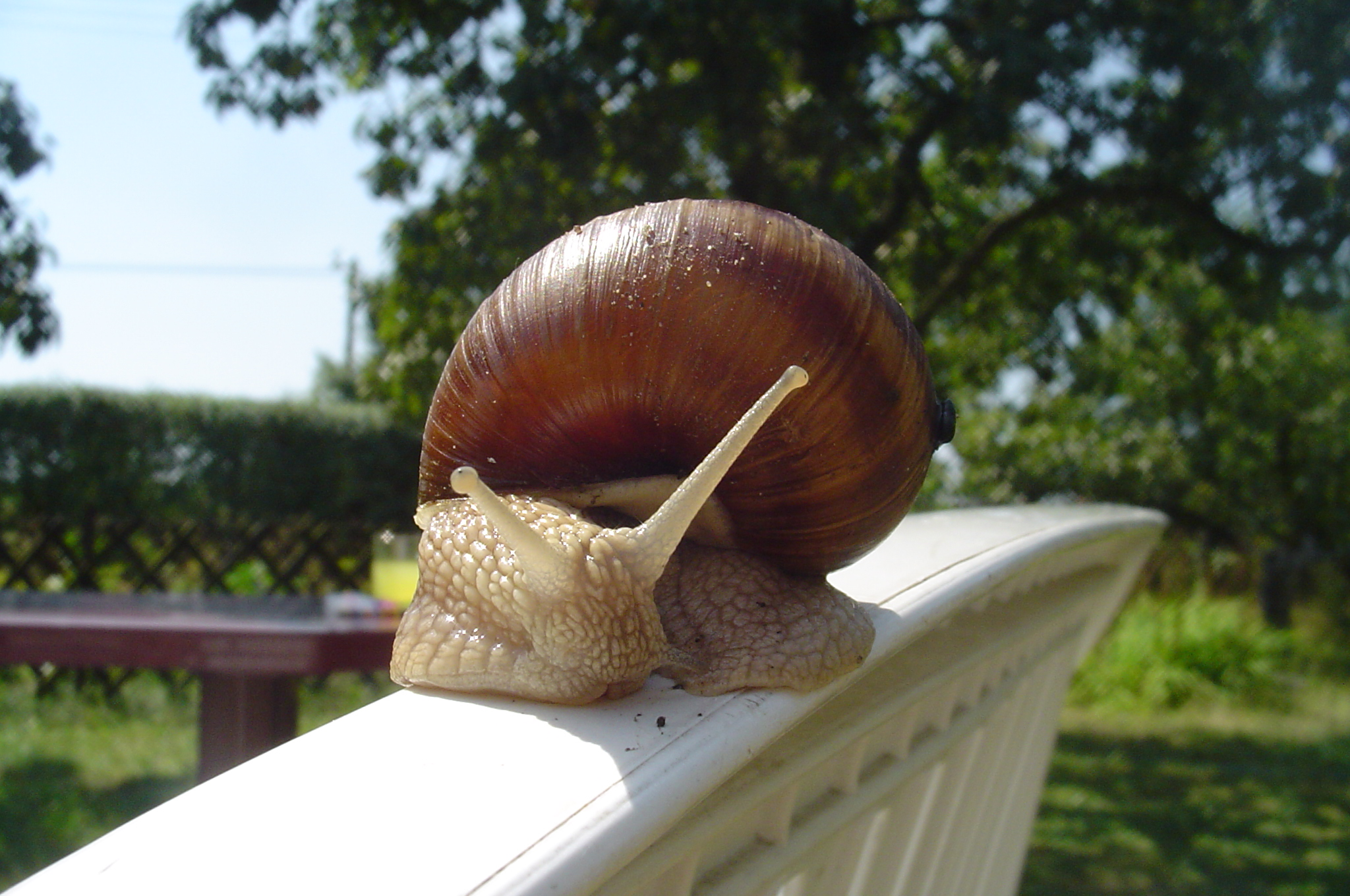 Helix pomatia